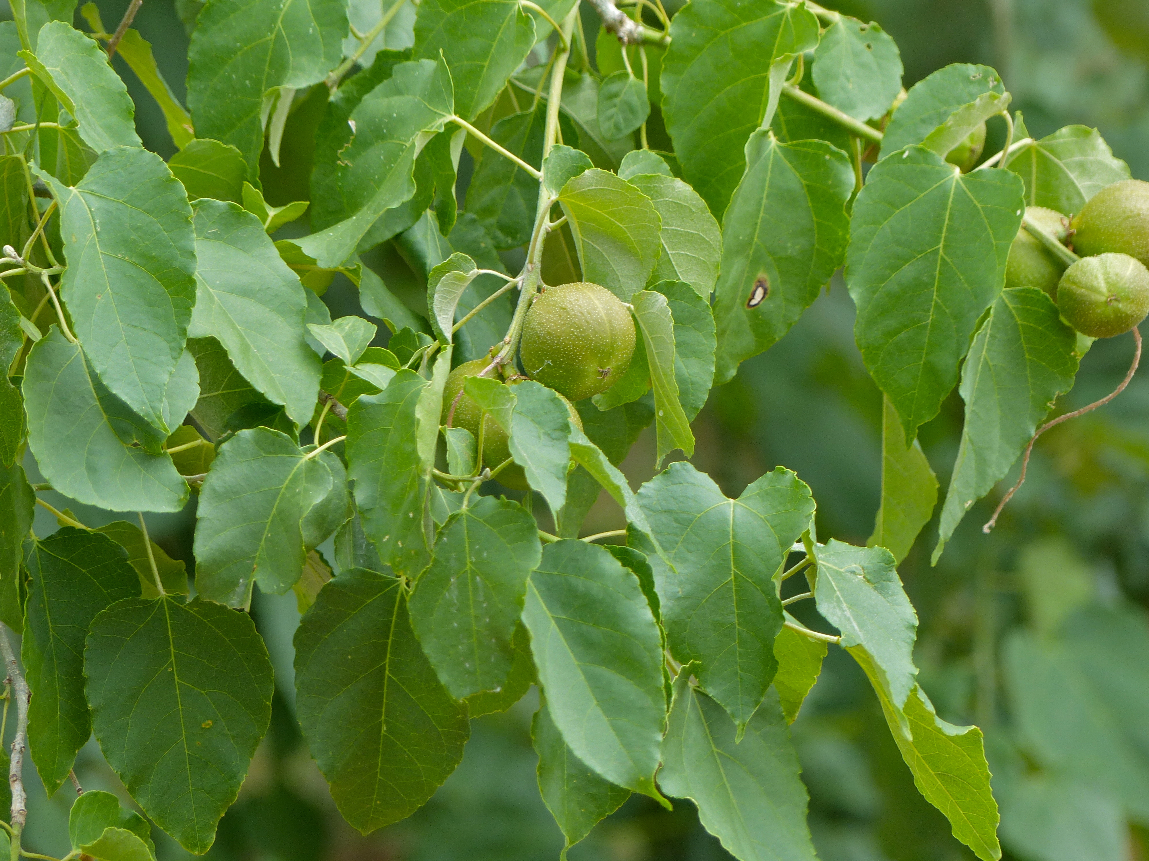 Nyala Drive, Pafuri area, Kruger NP, SOUTH AFRICA